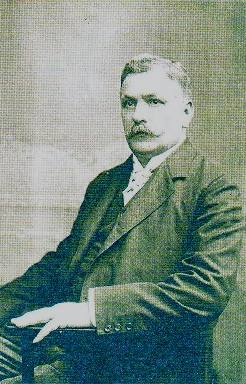 Corneliu Diaconovici (1859 - 1923)